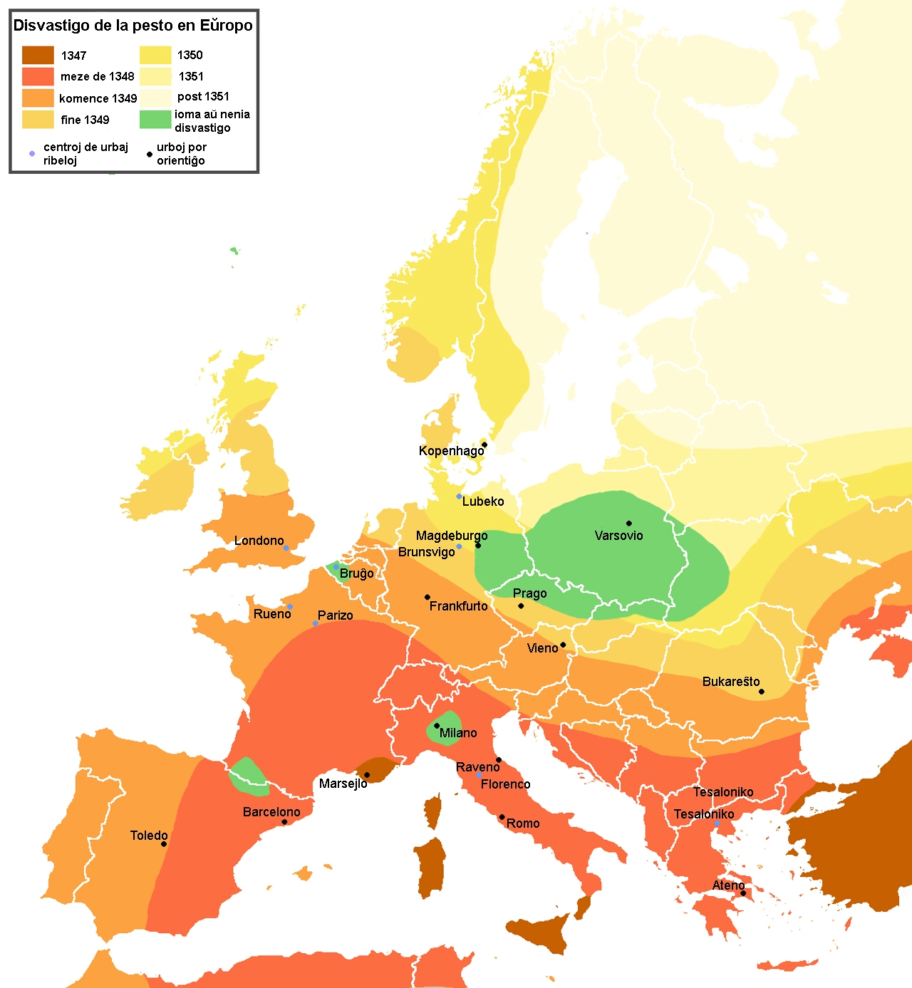 disvastiĝo de la pesto en Eŭropo